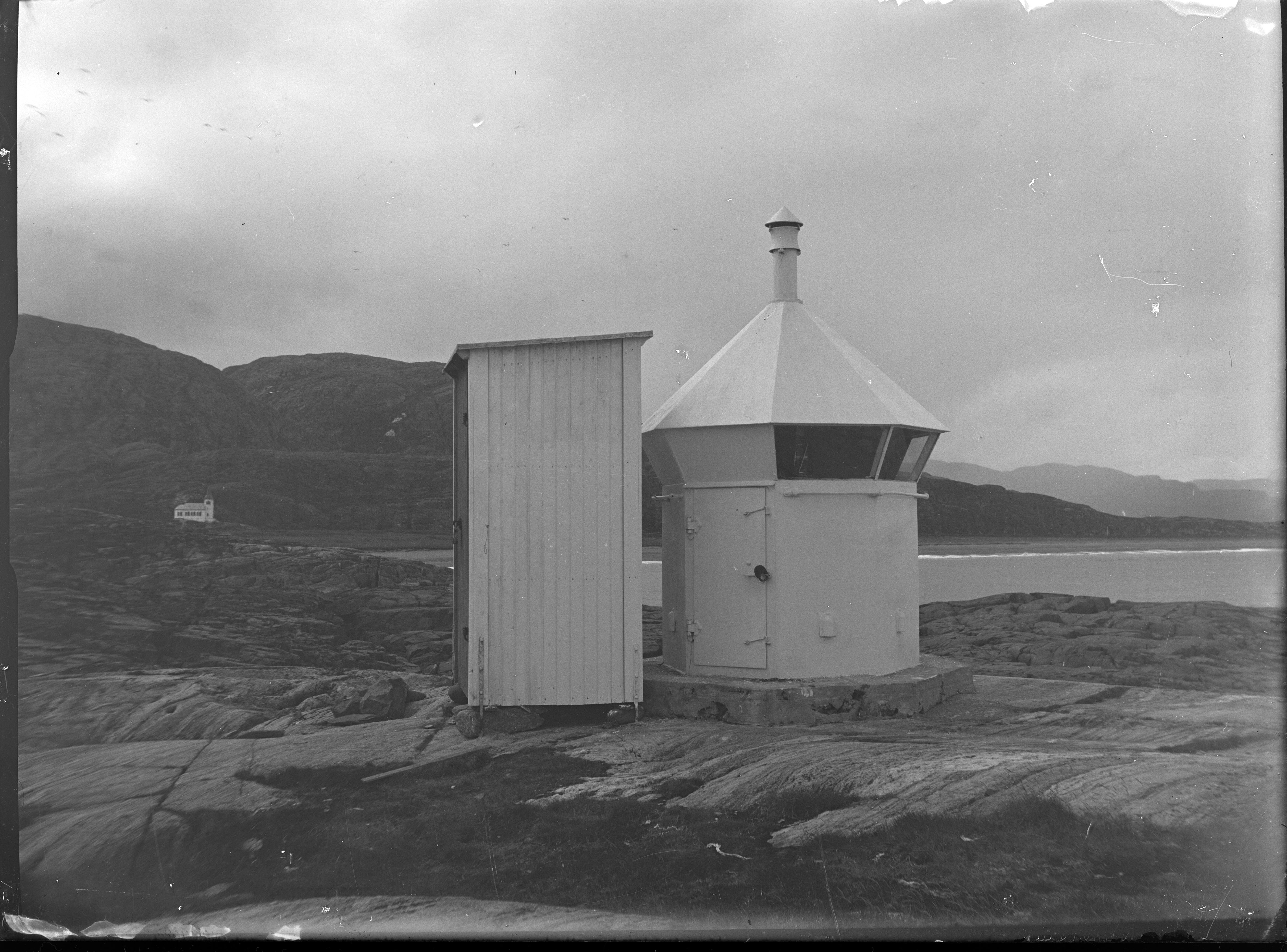 Records creator: Luotsi- ja majakkalaitos, \nArchive/Fond: Luotsi- ja majakkalaitoksen arkisto, \nSeries: Merimerkit, \nUnit: Uabb:588 Vuoreija (Vuoremi, Vardö); loisto kalliolla lähikuvassa